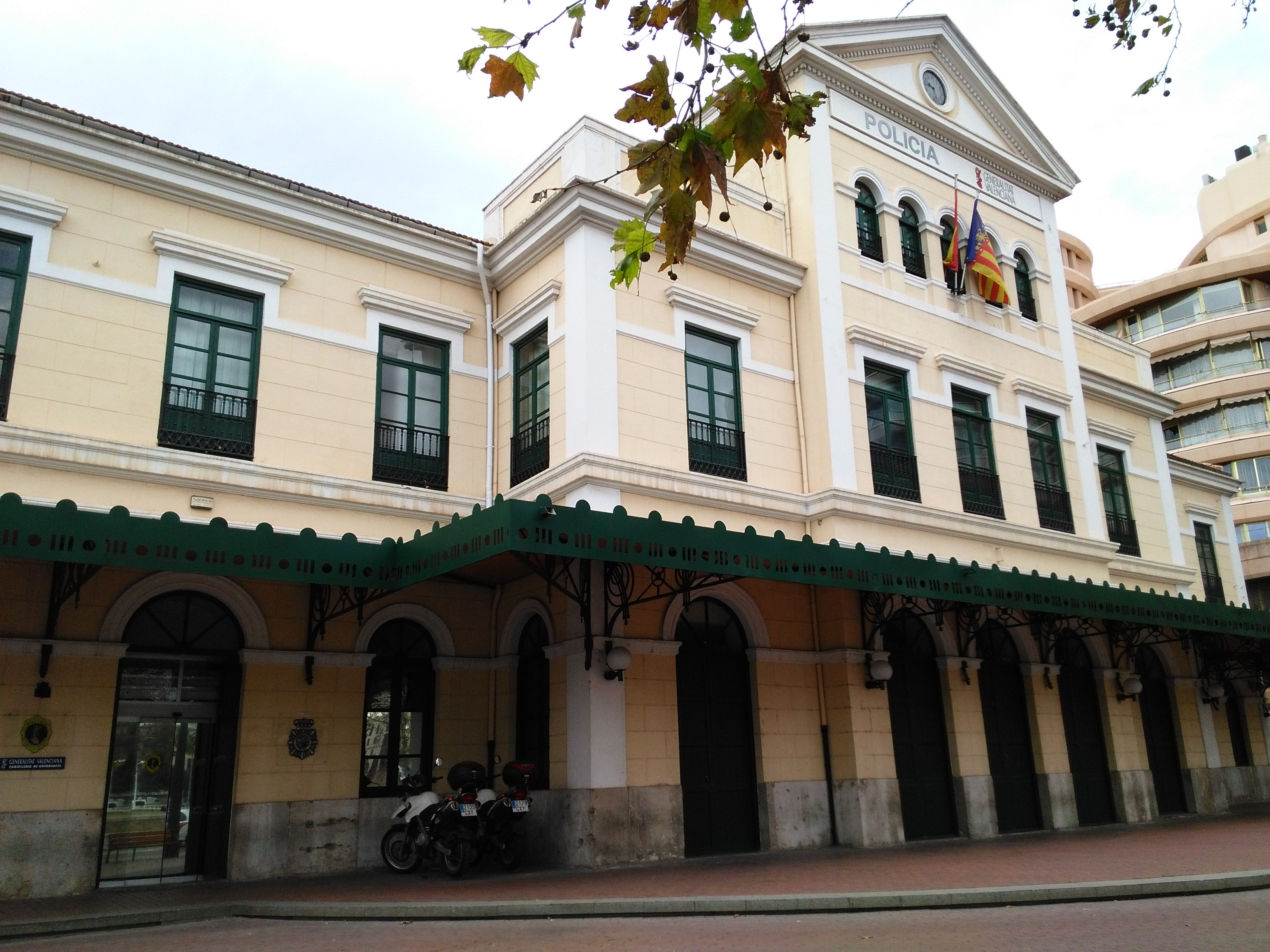 Sede Policía de la Generalitat. Pont de fusta.